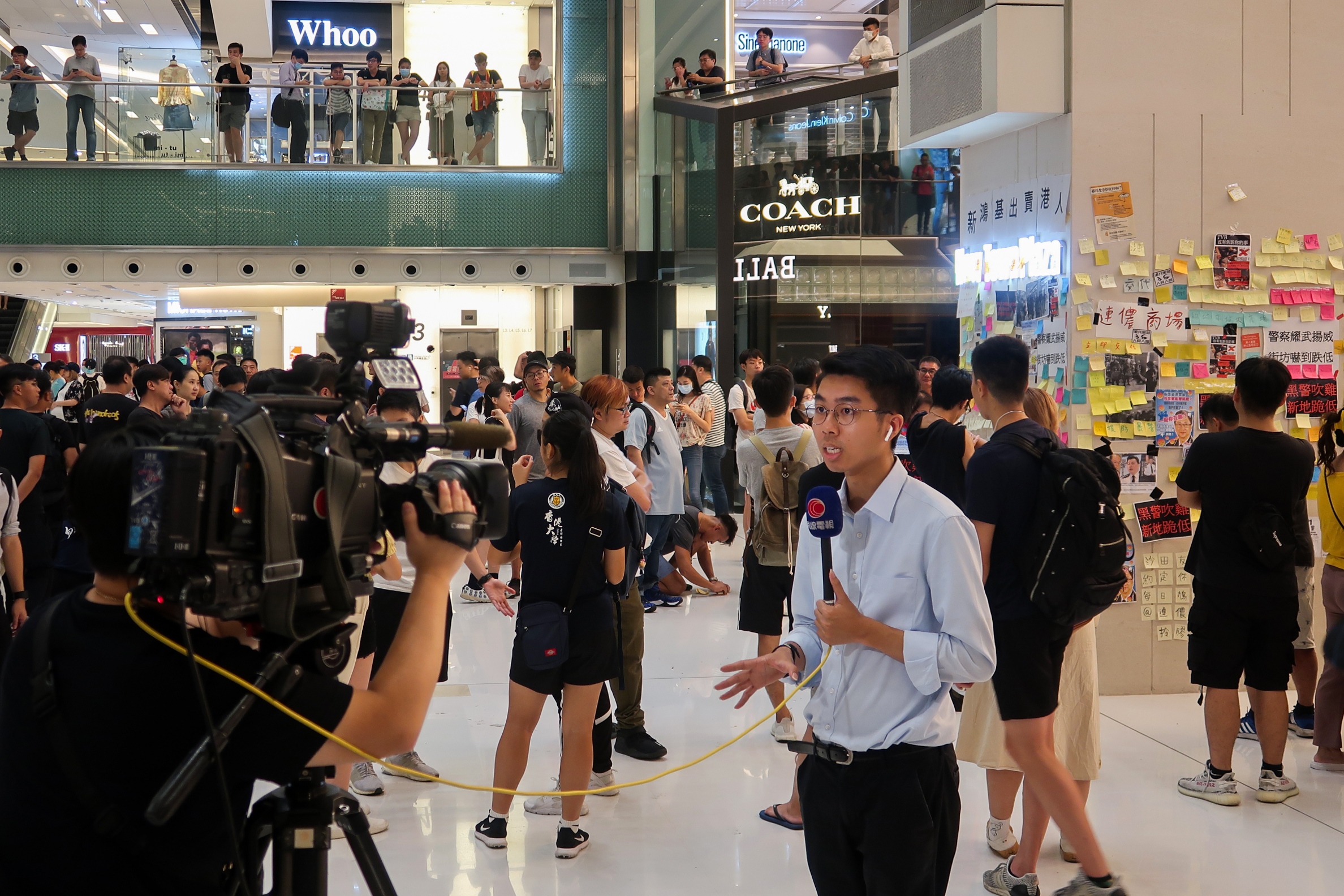 CATV reporter